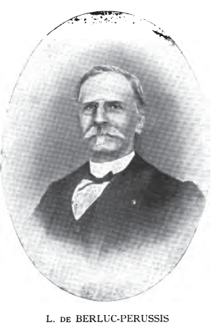 Leon de Berluc Perlussis